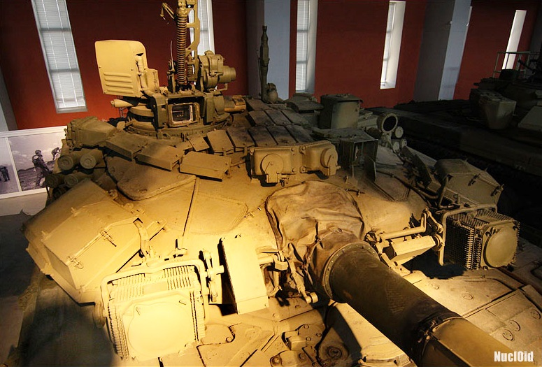 Turm eines T-90-Panzers.